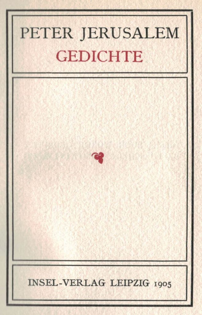 Titelblatt von: Peter Jerusalem, Gedichte, Insel-Verlag, 1905.